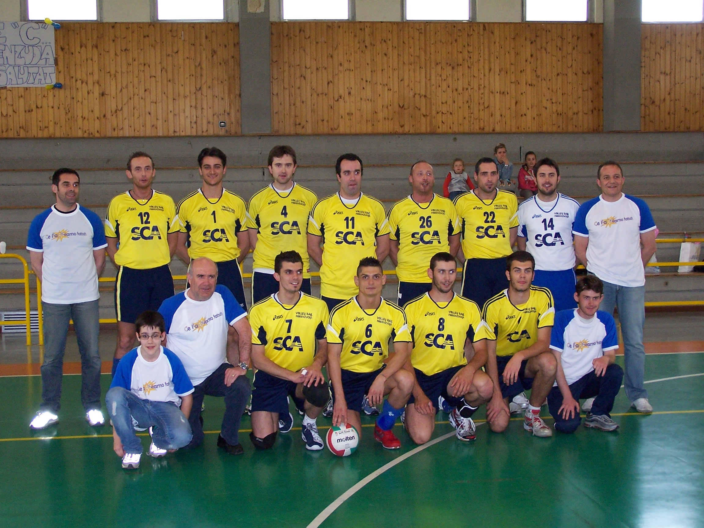 Rosa della squadra promossa in serie B2